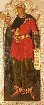 Benjamin. Russian icon/ Праотец Вениамин